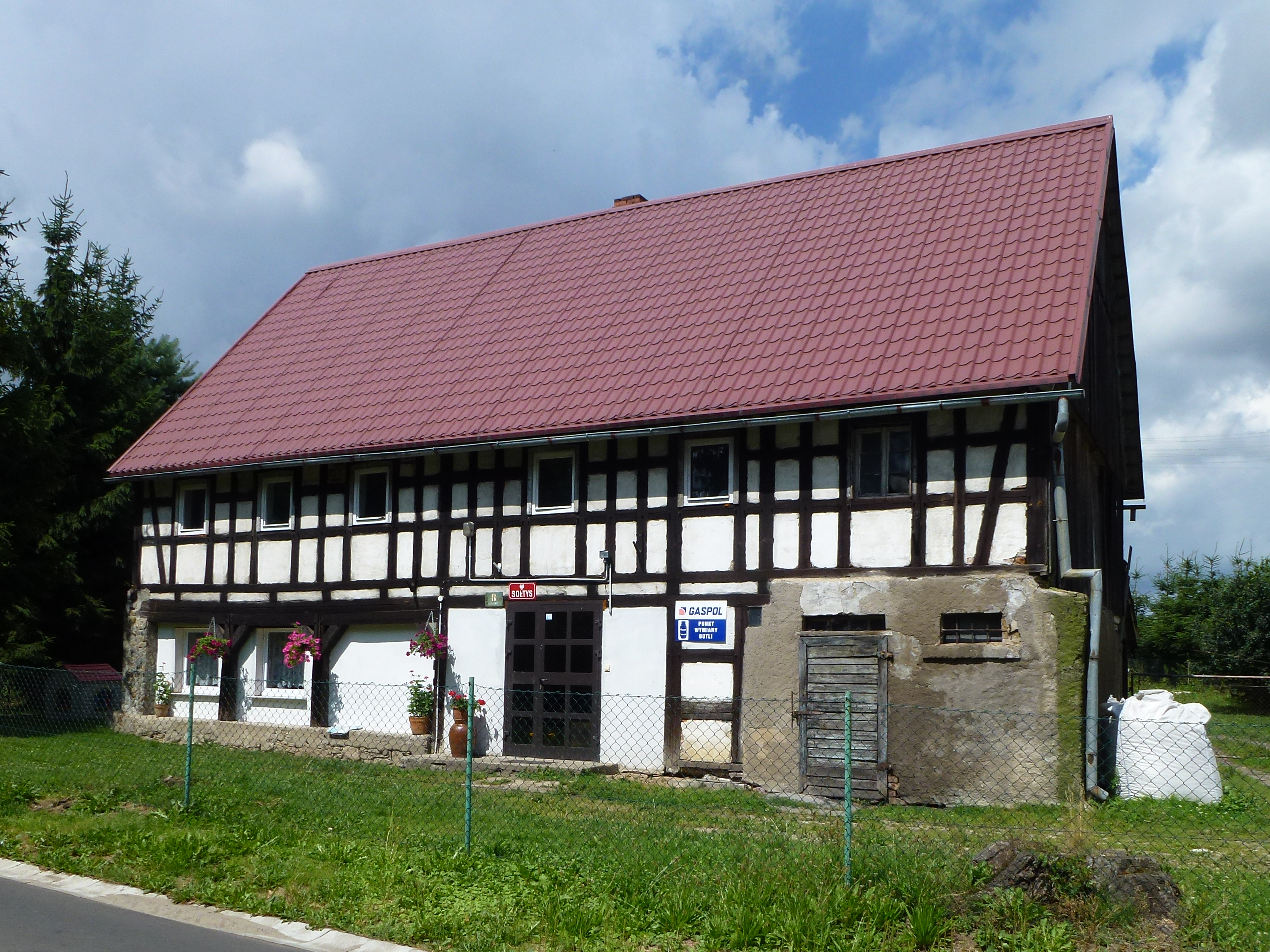 Gebäude Nr. 8 in Karlsberg am Queis.